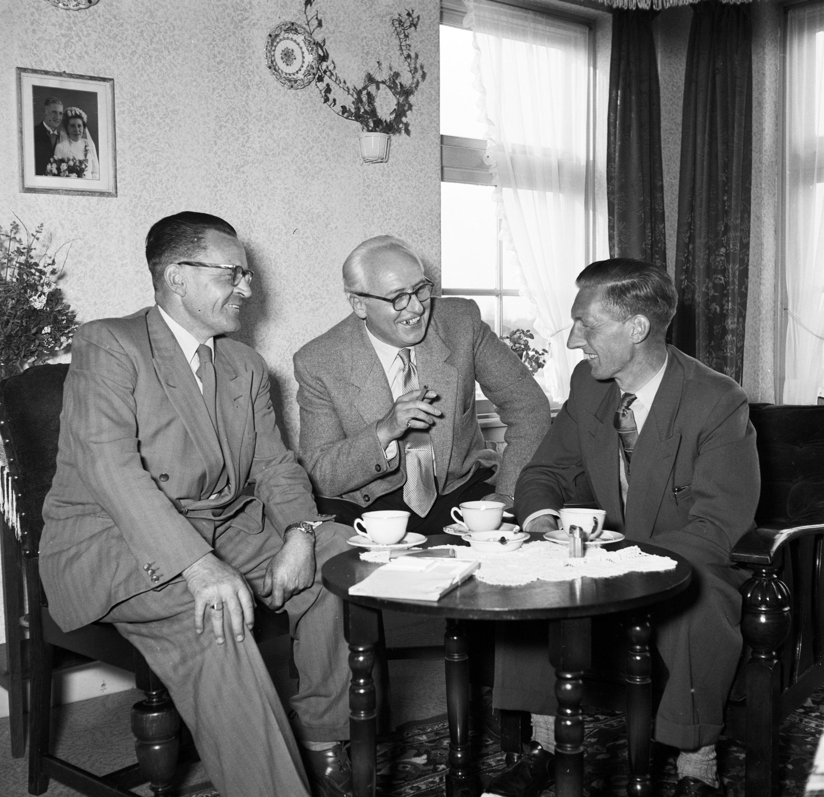 Collectie / Archief : Fotocollectie Van de Poll Reportage / Serie : [ onbekend ] Beschrijving : Gerard de Jong in gesprek met Ynse Postma en de fotograaf Willem van de Poll. Aan de wand een trouwfoto van het echtpaar De Jong Annotatie : Gerard de Jong overleefde als enige een fusillade op 7 april 1945 bij Dronrijp. Ynse Postma verleende De Jong eerste hulp en hielp bij diens transport naar een onderduikadres Datum : 1955-00-01 Locatie : Friesland, Leeuwarden Trefwoorden : EHBO, bezoekers, foto's, gesprekken, hulpverlening, huwelijken, interieurs, meubilair, onderduikers, serviesgoed, woningen Persoonsnaam : Jong, Gerard de, Poll, Willem van de, Postma, Ynse Fotograaf : Poll, Willem van de Auteursrechthebbende : Nationaal Archief Materiaalsoort : Negatief (6x6) Nummer archiefinventaris : bekijk toegang 2.24.14.02 Bestanddeelnummer : 254-3341